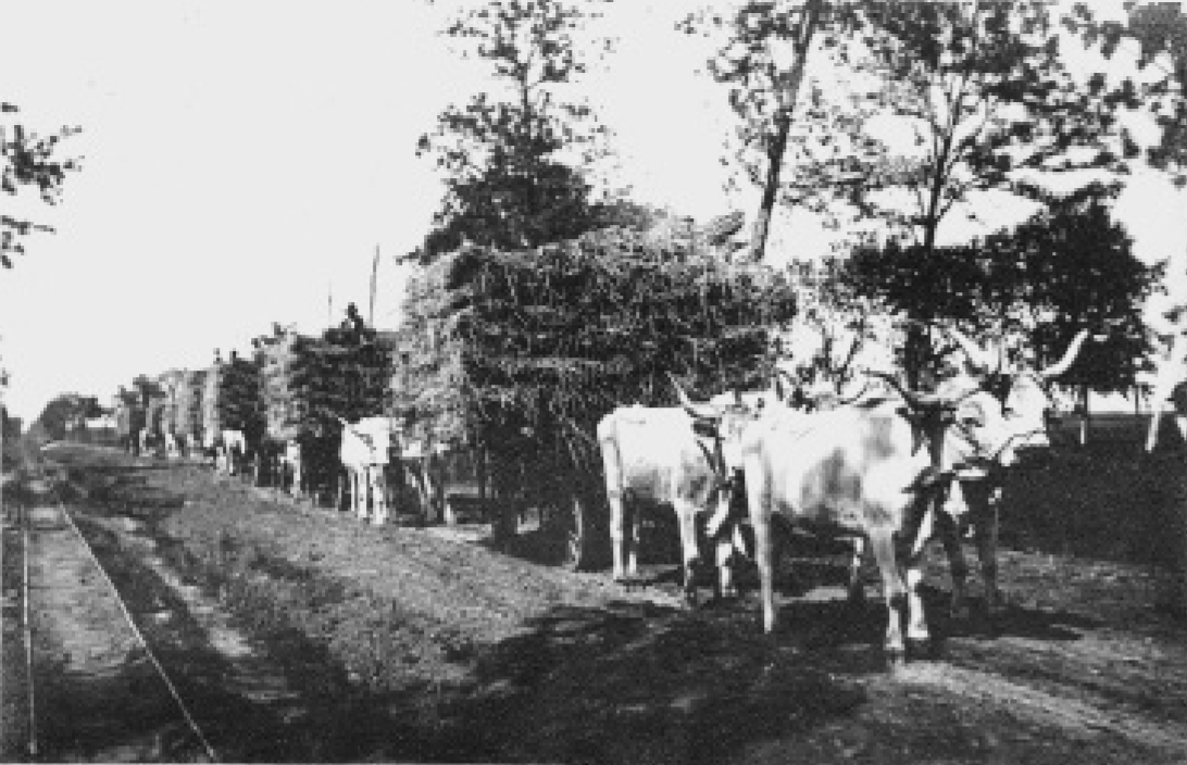 I.C.A.R. - Transportul cânepei de fuior la fabrica din Pordeanu, 1940. În stânga fotografiei șinele trenulețului Decauville.